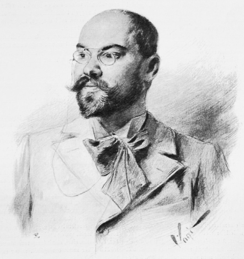 Roskovics Ignác festőművész portréja. Vágó Pál rajza